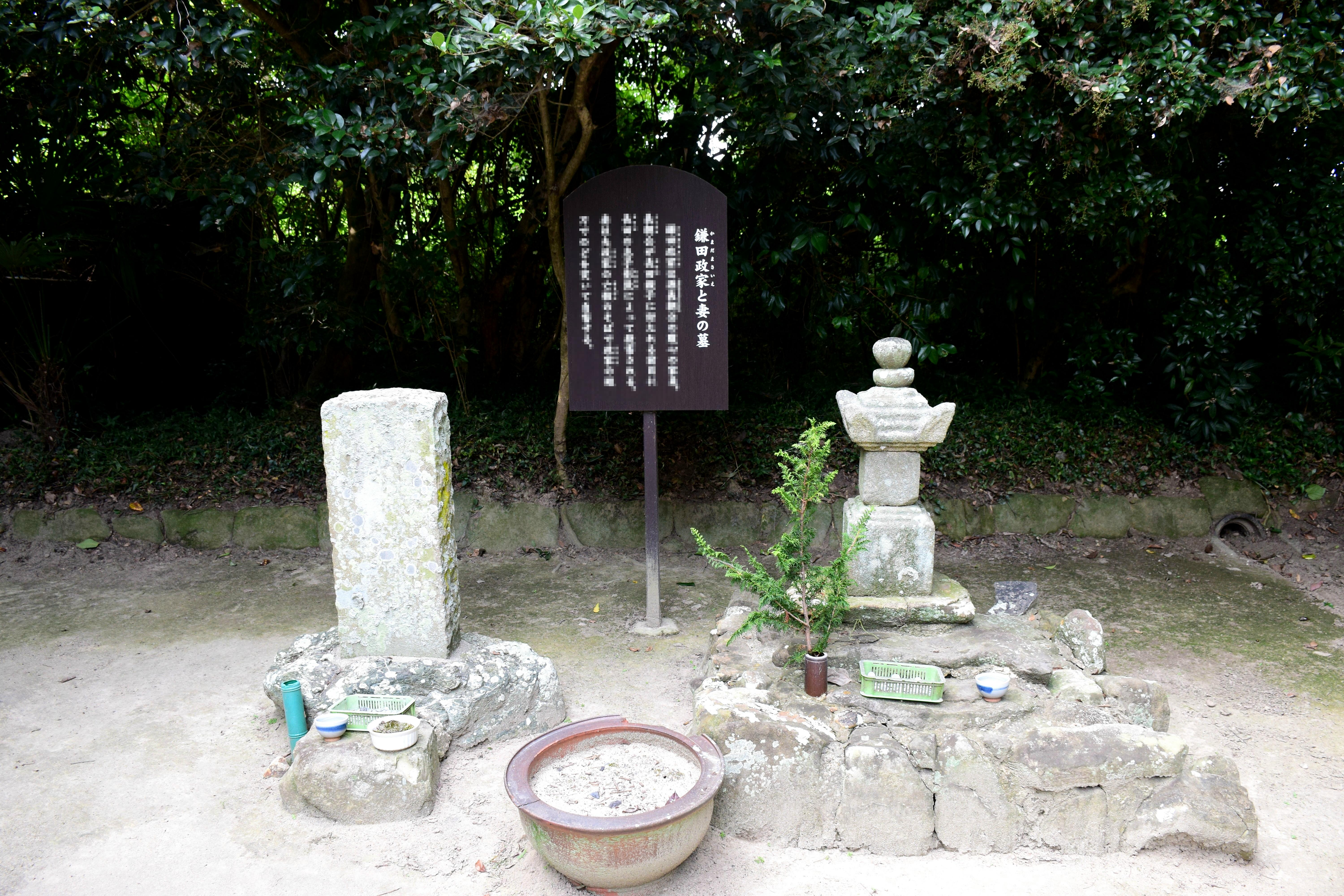 鎌田正清夫妻の墓